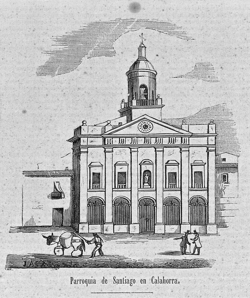 Parroquia de Santiago en Calahorra.